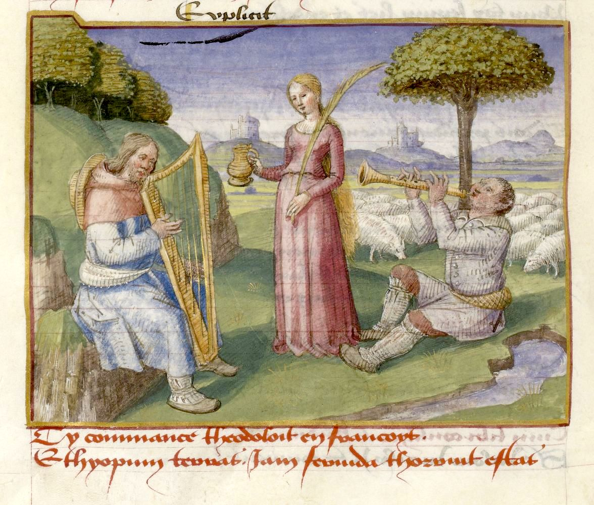 Théodolet folio 111v. Miniature de Jean Bourdichon (détail)